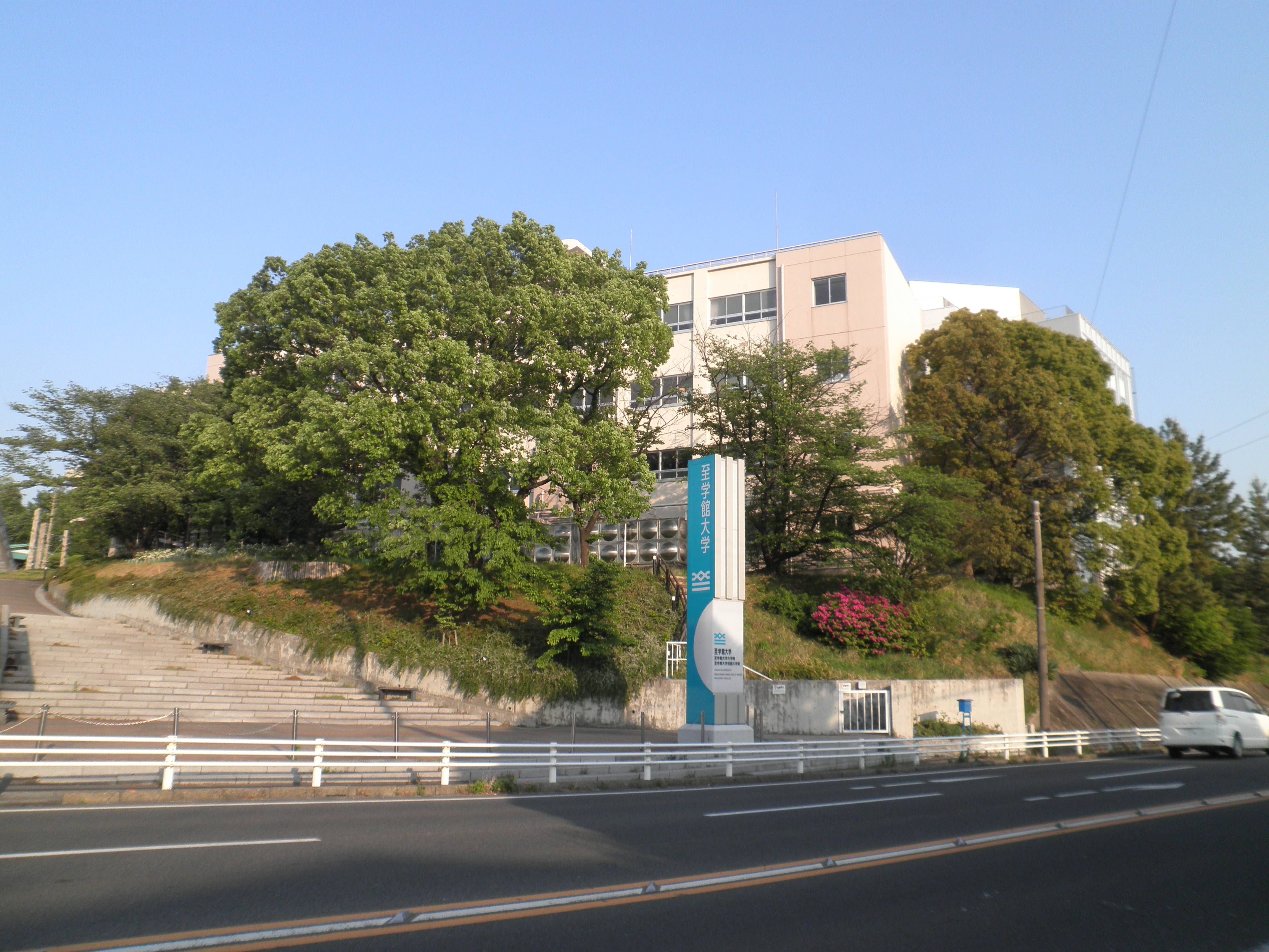 愛知県大府市横根町にある至学館大学